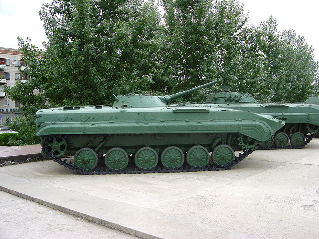 Volgograd: BMP. Eigen foto Mark Voorendt, juli 2005.